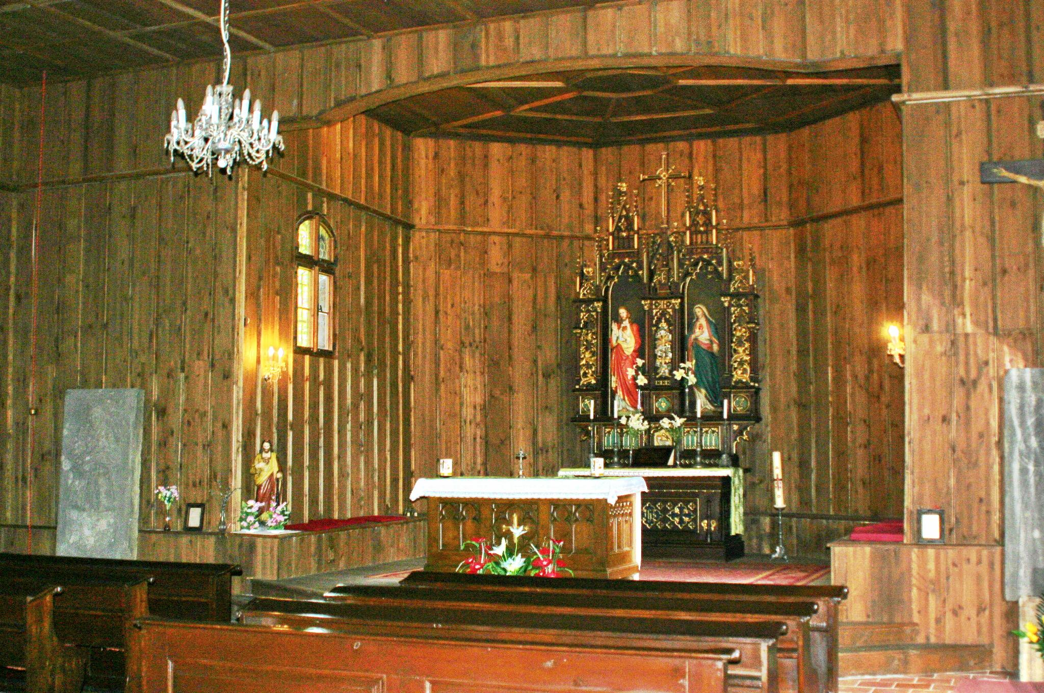 Presbyterium der Kirche in Český Jiřetín (Georgendorf)